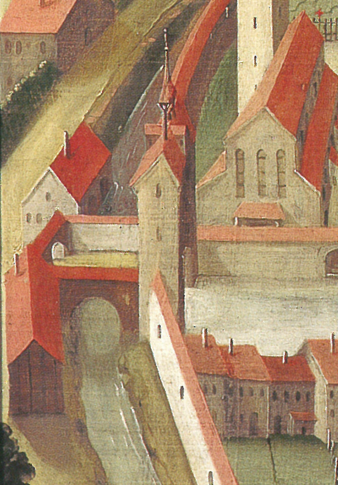 Isny im Allgäu, Stadtansicht von 1737 (Städtische Museen Isny) Wassertor